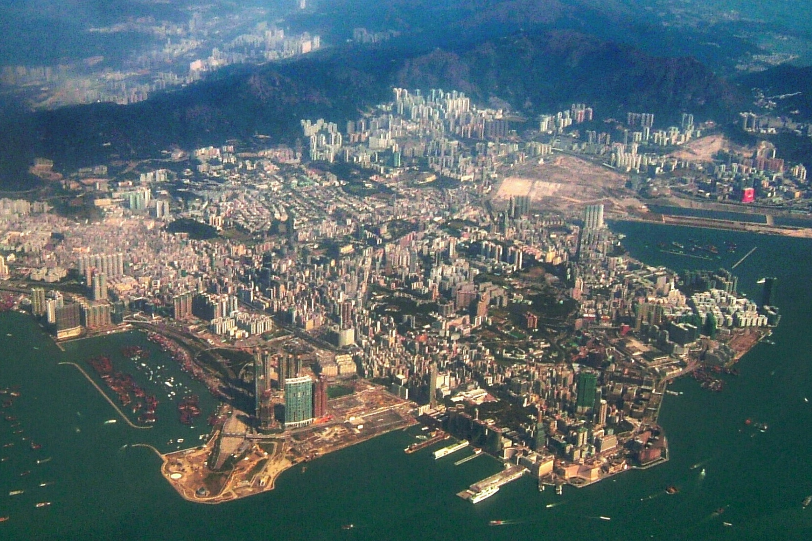 West Kowloon, Hong Kong